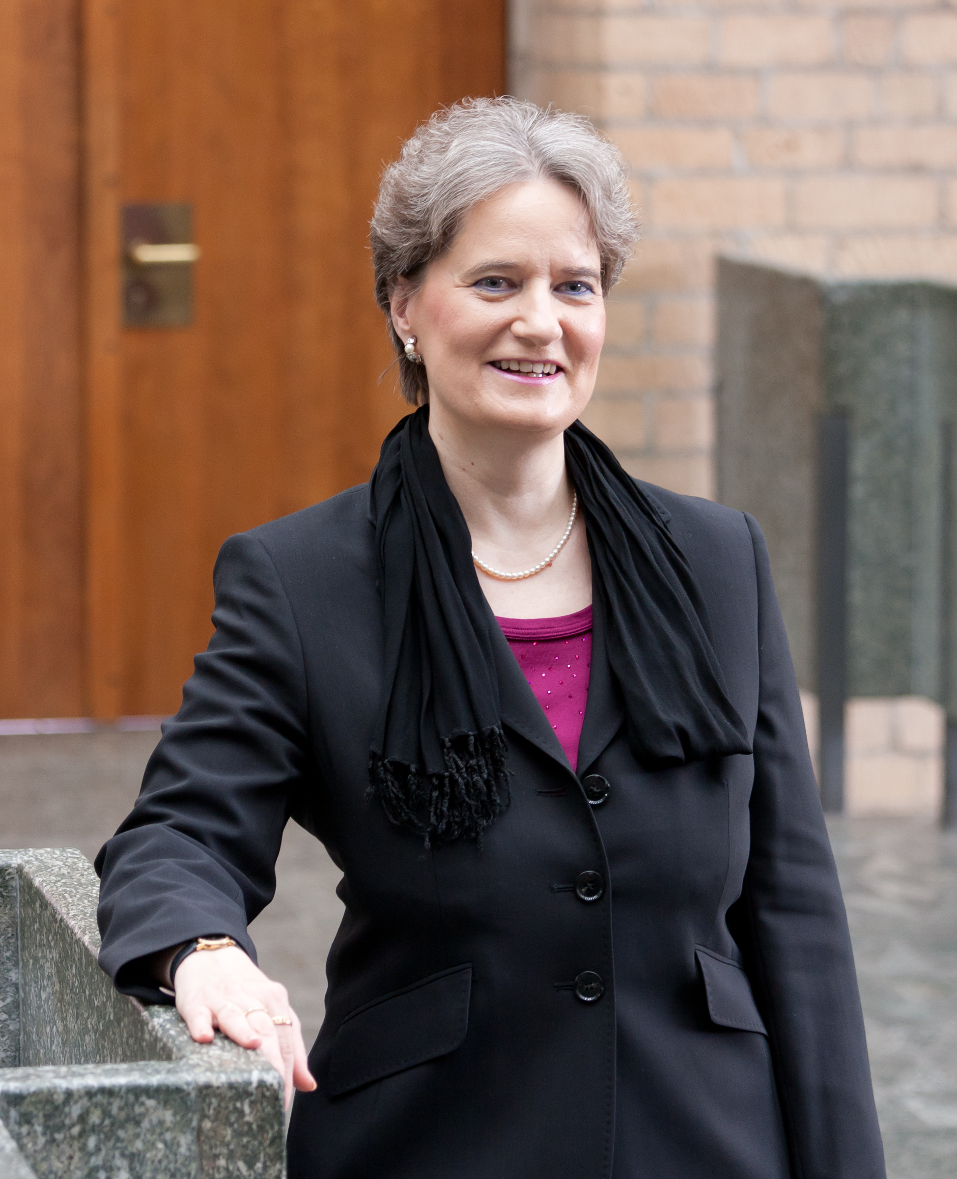 Susanne Laugwitz-Aulbach, ab 1. September 2013 amtierende Kulturdezernentin der Stadt Köln.